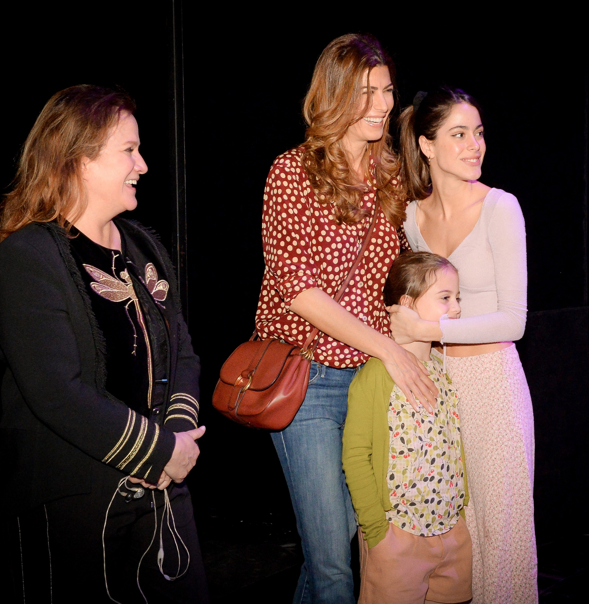 La primera dama Juliana Awada asistió al concierto de dúos entre artistas argentinas y españolas en el marco del festival “Únicos” que se realiza en Madrid. “Únicos” es un festival en que los artistas más populares interpretan sus mejores canciones en formato sinfónico y con representación de todos los estilos. Luego de presentarse en el Teatro Colón, la tercera edición del espectáculo desembarcó en el Teatro Real de Madrid como el gran evento cultural argentino-español. La Primera Dama concurrió por la tarde al ensayo general y por la noche al concierto acompañada por el embajador de la Argentina en España, Ramón Puerta. Bajo la dirección de orquesta del gran maestro Gerardo Gardelín, participaron Tini Stoessel, Lali Espósito, Lucía Galán, Soledad Pastorutti, Marcela Morelo, Patricia Sosa, Niña Pastori, Pastora Soler, Vanesa Martín, Marta Sánchez, India Martínez y Bebe.